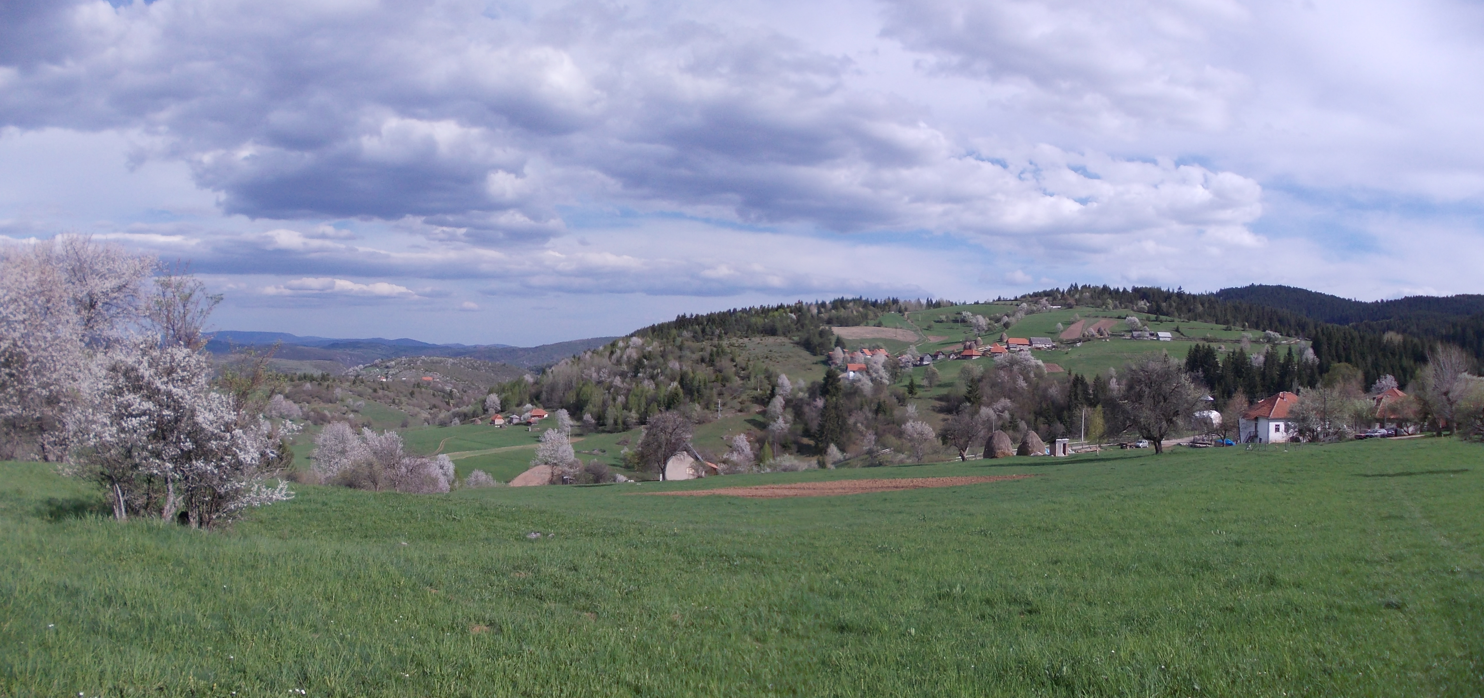 Radijevići